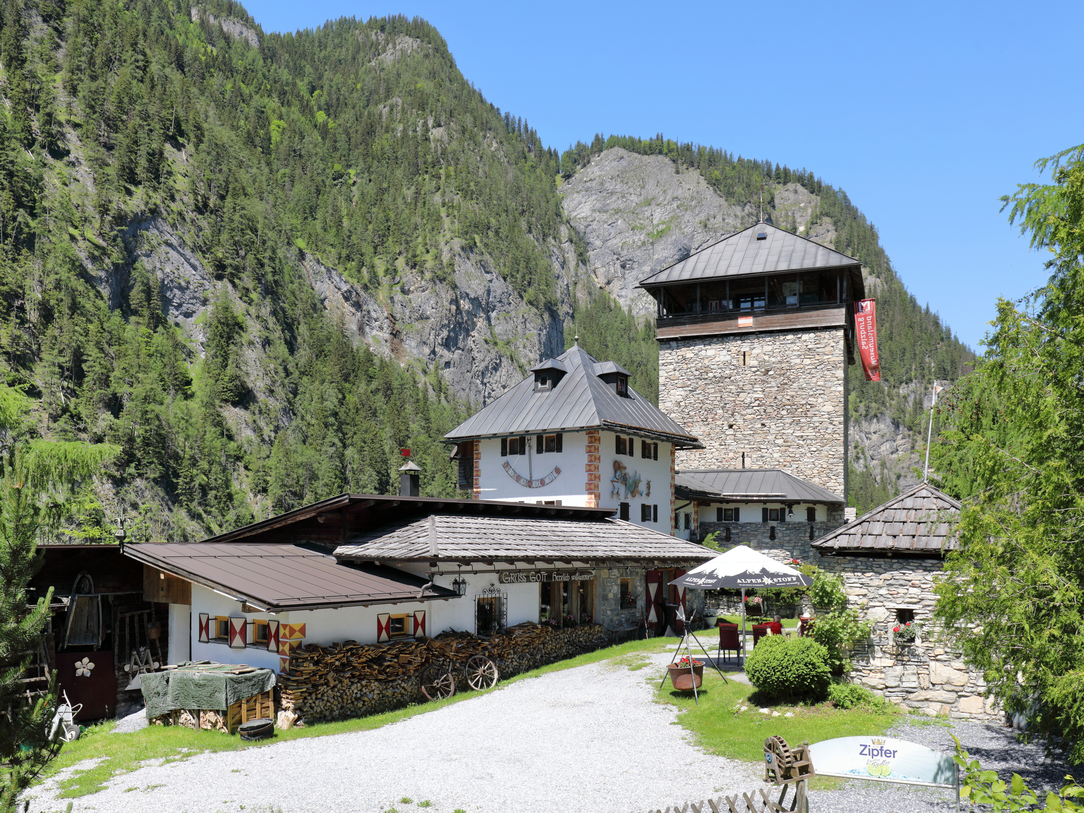 Südsüdostansicht der Burg Klammstein in der Salzburger Gemeinde Dorfgastein.Die Burg wurde im 13. Jahrhundert auf einem etwa 30 m hohen Felsen südseitig der Gasteiner Klamm bzw. am Taleingang des Gasteinertales errichtet. Ab dem 16. Jahrhundert verfiel die Burg und das Mauerwerk wurde teilweise als Steinbruch für andere Bauten verwendet. 1972 kaufte ein Adolf Ferner die Ruine den Österreichischen Bundesforsten ab und sanierte die Burg bzw. baute sie teilweise wieder auf.